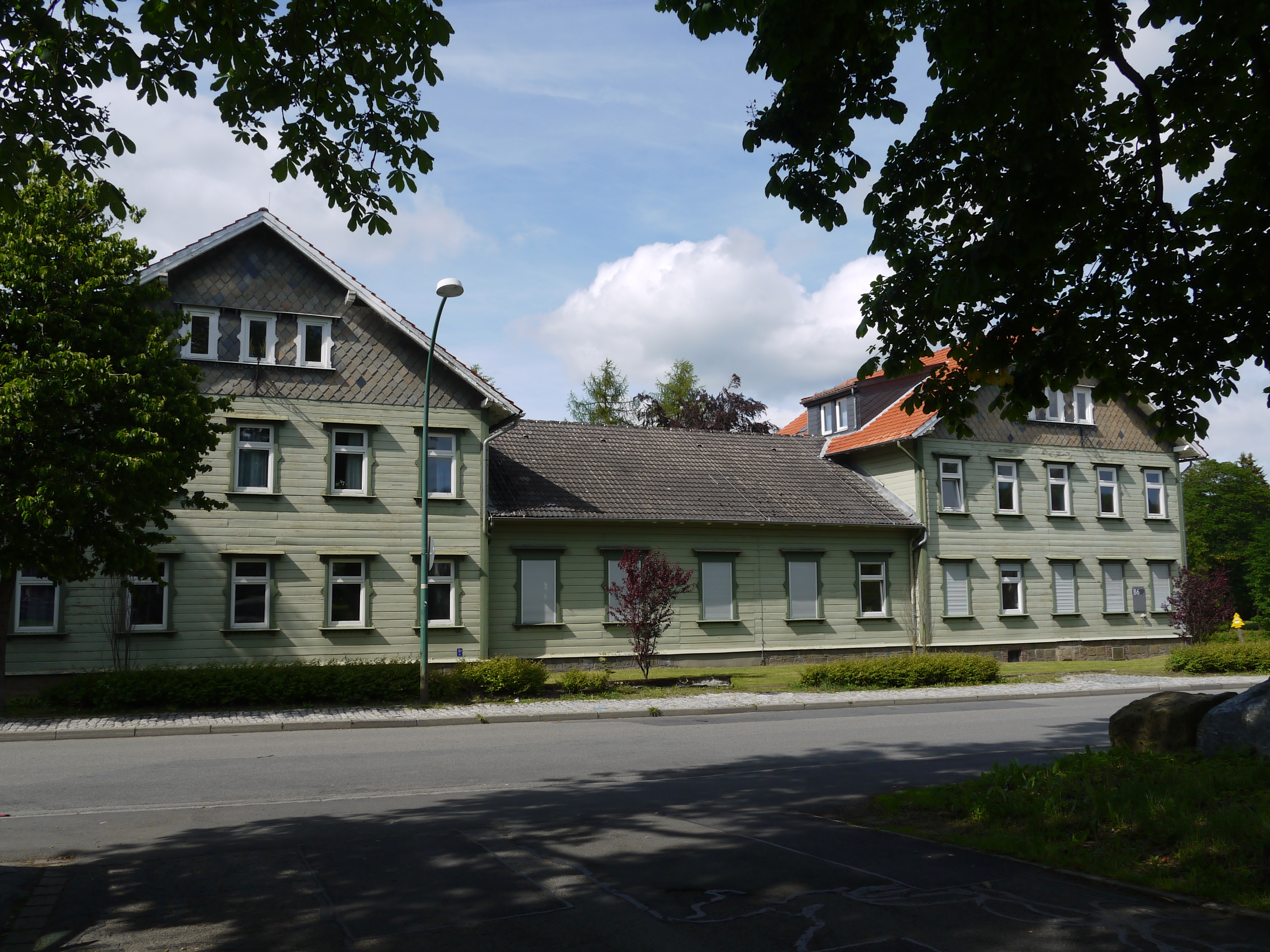 Rechenzentrum der Technische Universität Clausthal an der Erzstraße